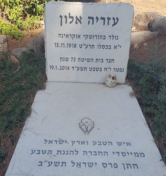 קברו של "מר טבע" עזריה אלון בבית העלמין בית השיטה. עזריה אלון נולד בהורושקי שבאוקראינה בתאריך 15.11.18. הוא היה חבר קיבוץ בית השיטה שבעמק חרוד במשך 75 שנים. נפטר ב-19.1.2014 והוא בן 95 במותו על קברו נחקק: ""איש הטבע וארץ ישראל ממיסדי החברה להגנת הטבע חתן פרס ישראל תשע"ב". במרכז המצבה מצויר אירוס - סמל החברה להגנת הטבע שעזריה אלון היה ממייסדיה" .